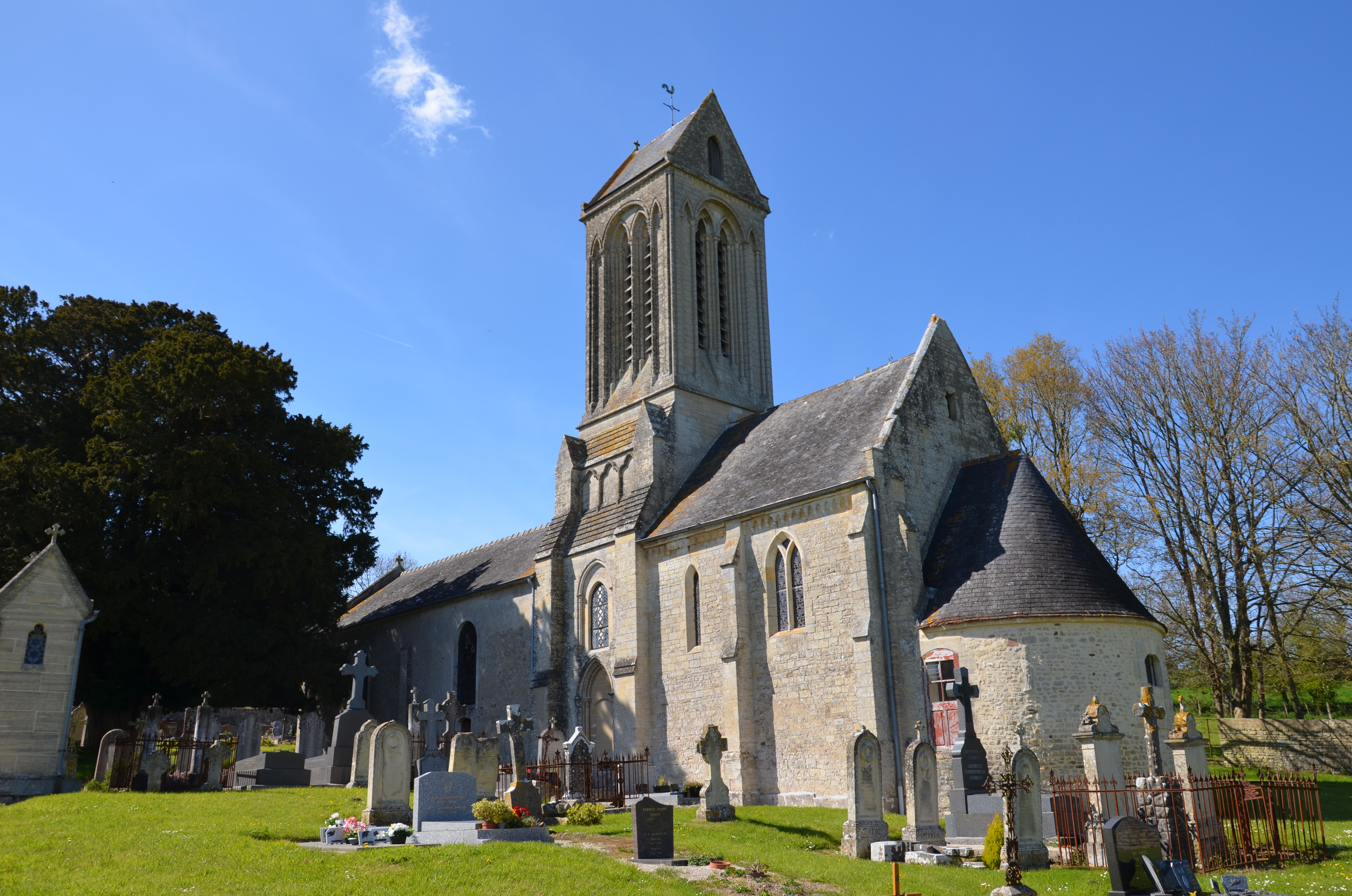 Église Saint-Éloi de Russy.